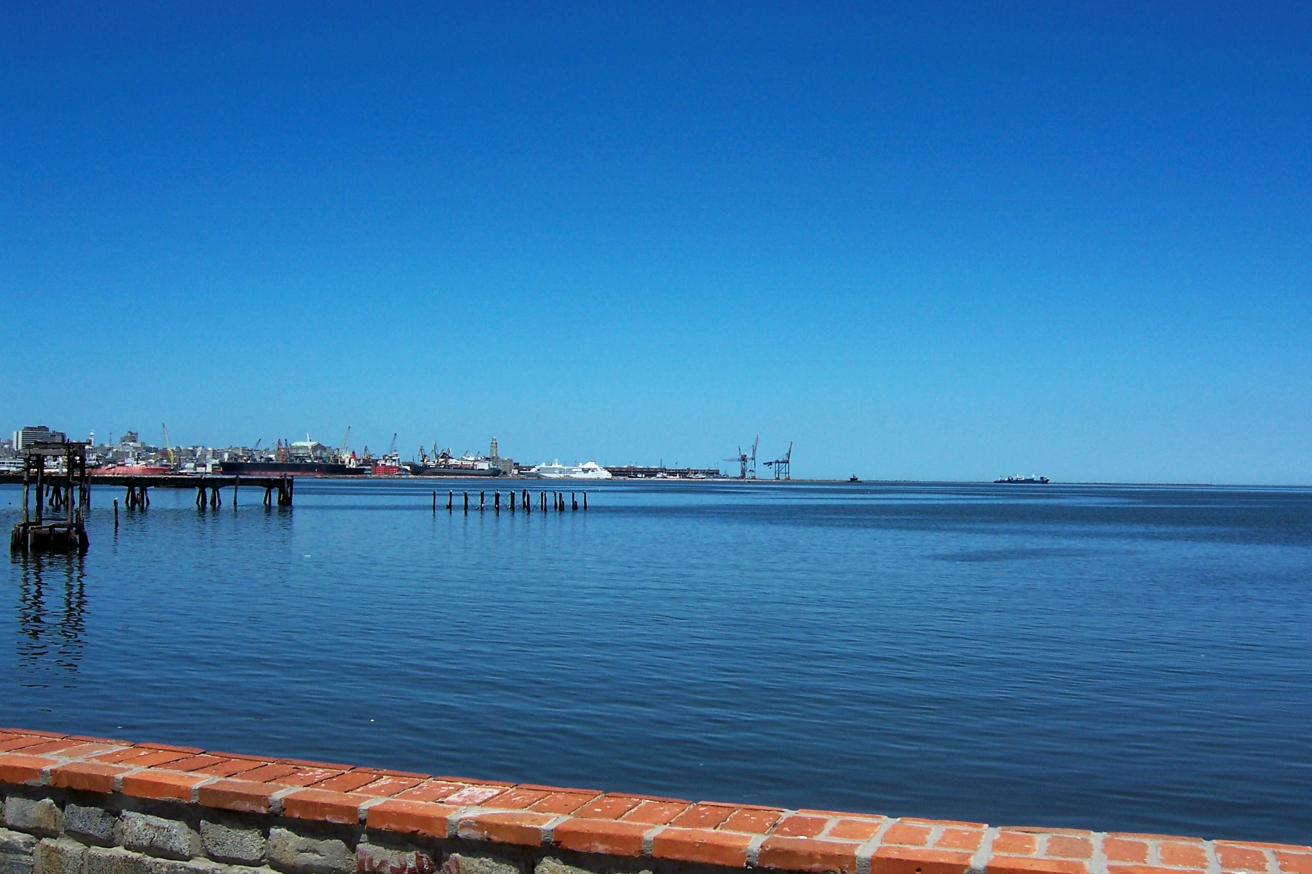 Vista parcial de la bahía y puerto de Montevideo.